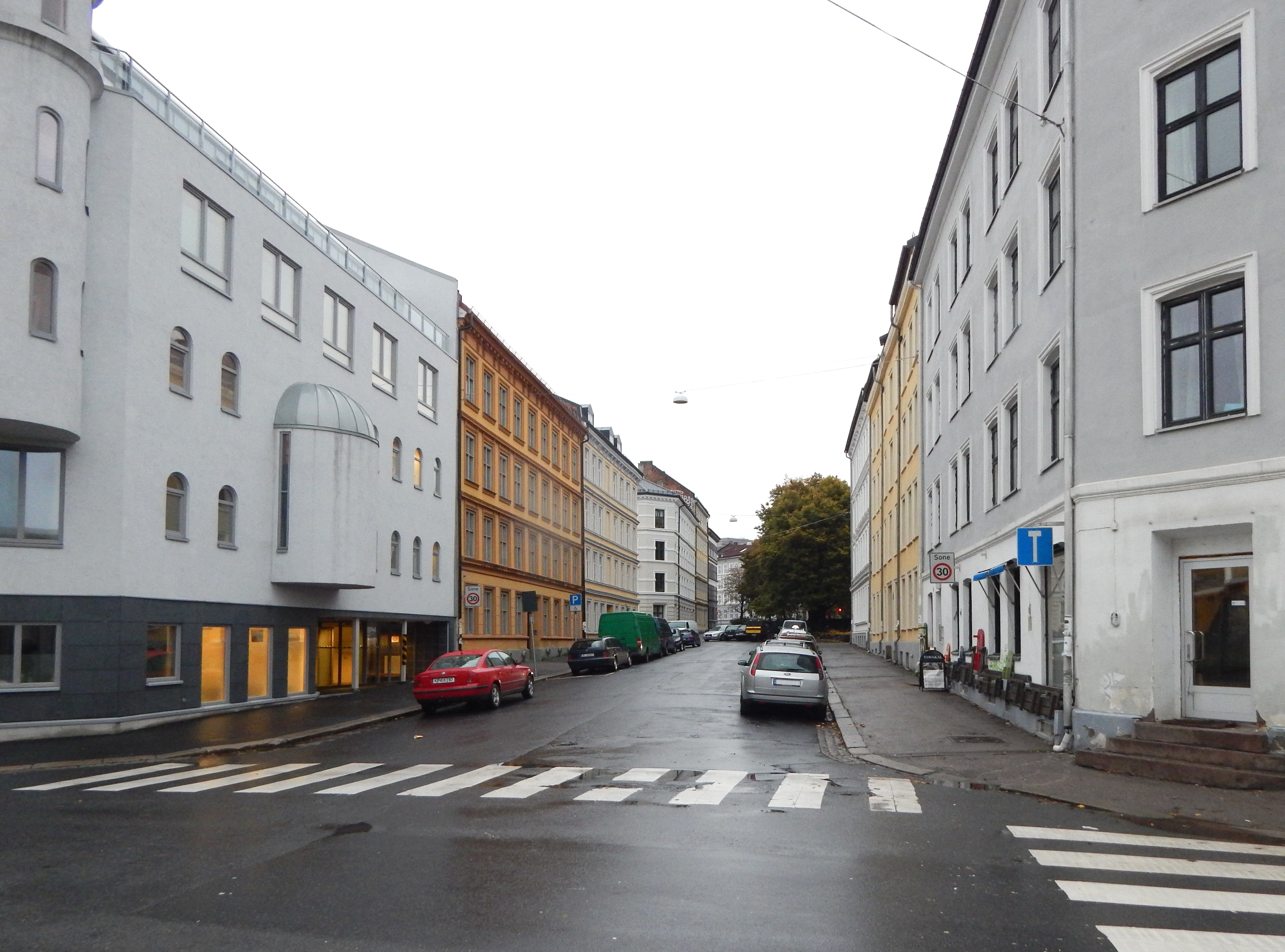 Håkons gate sett fra Åkebergveien